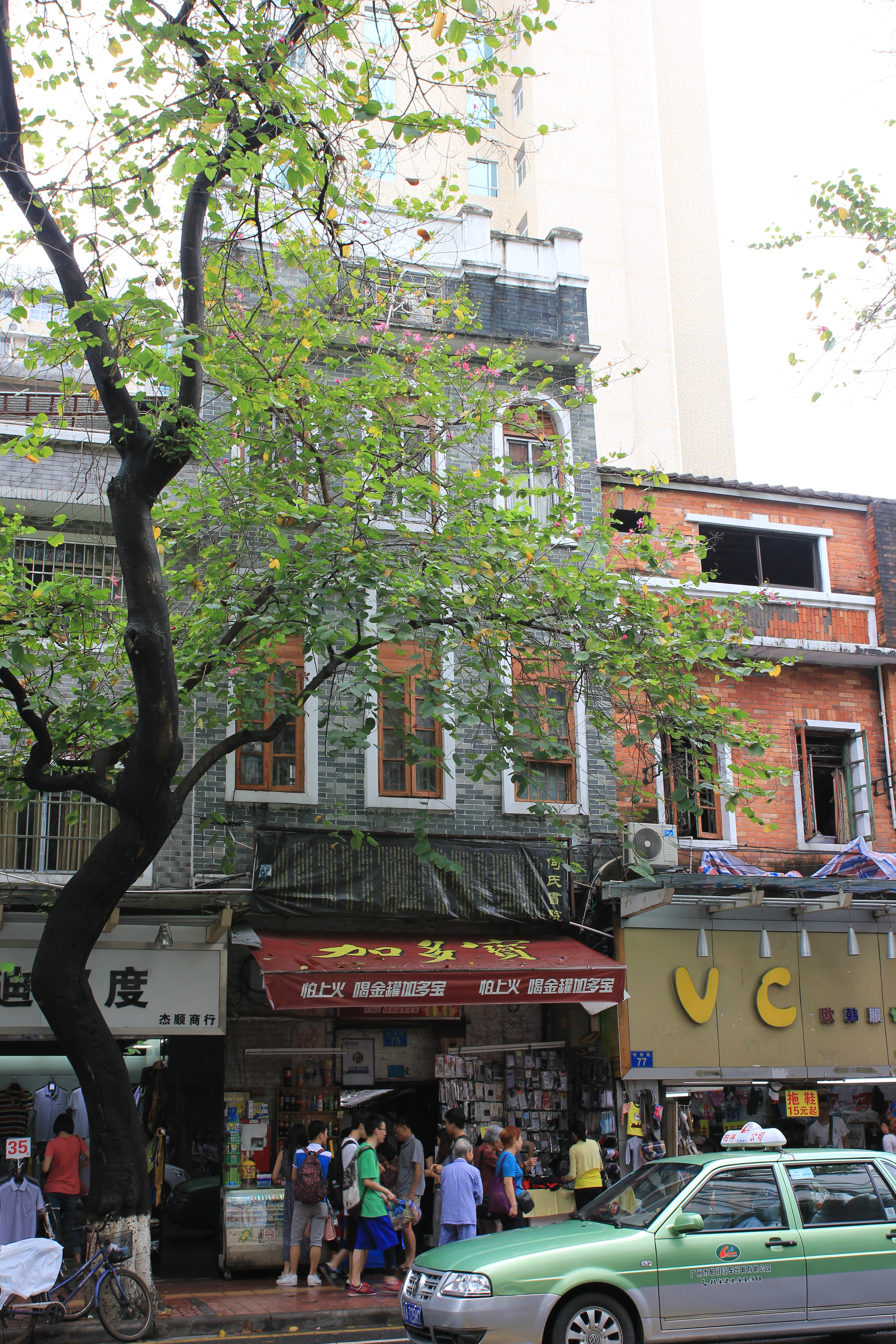 位于广东省广州市越秀区教育路75号。2014年1月26日公布为广州市历史建筑。